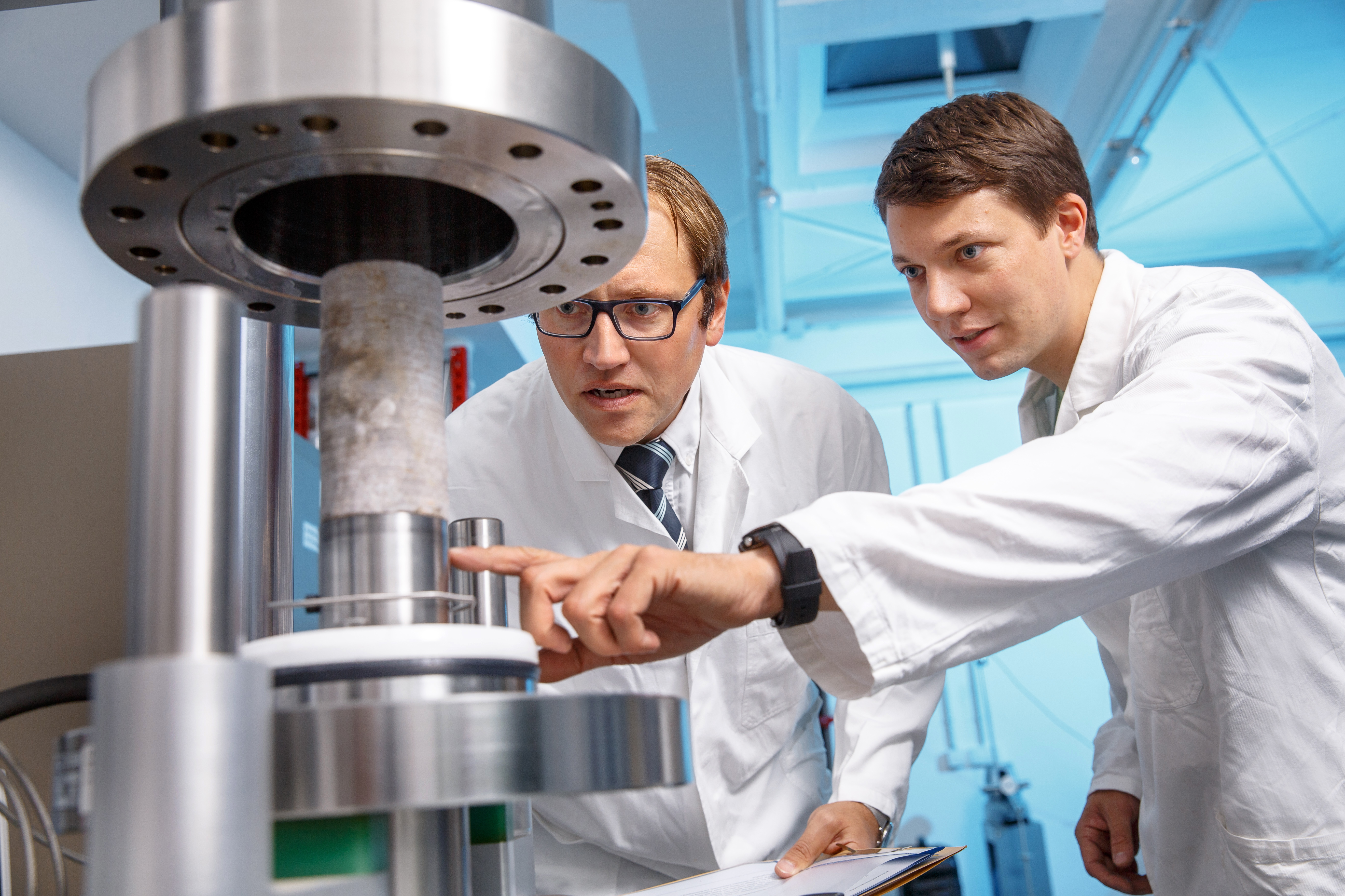 Bohrkernprüfung im Forschungszentrum Nachbergbau - Technische Hochschule Georg Agricola Bochum - Foto Volker Wiciok